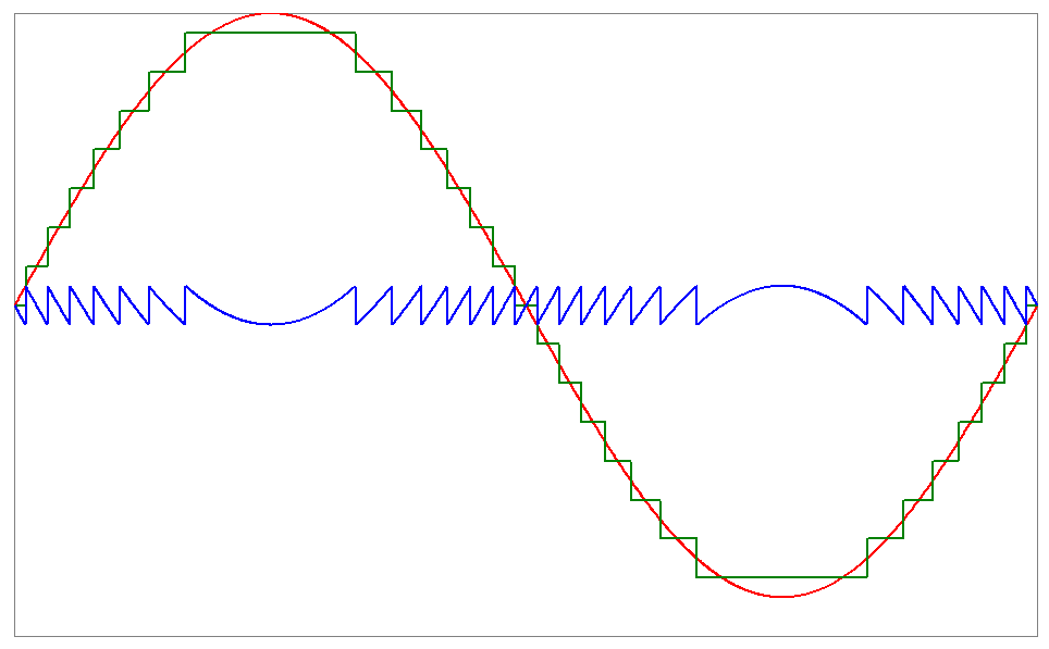 Análisis Ruido de Cuantificación 4 bits